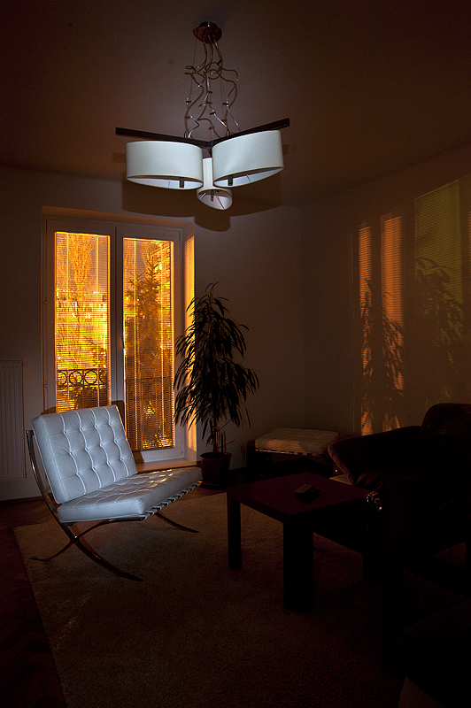 Barcelona chair / Kreslo Barcelona